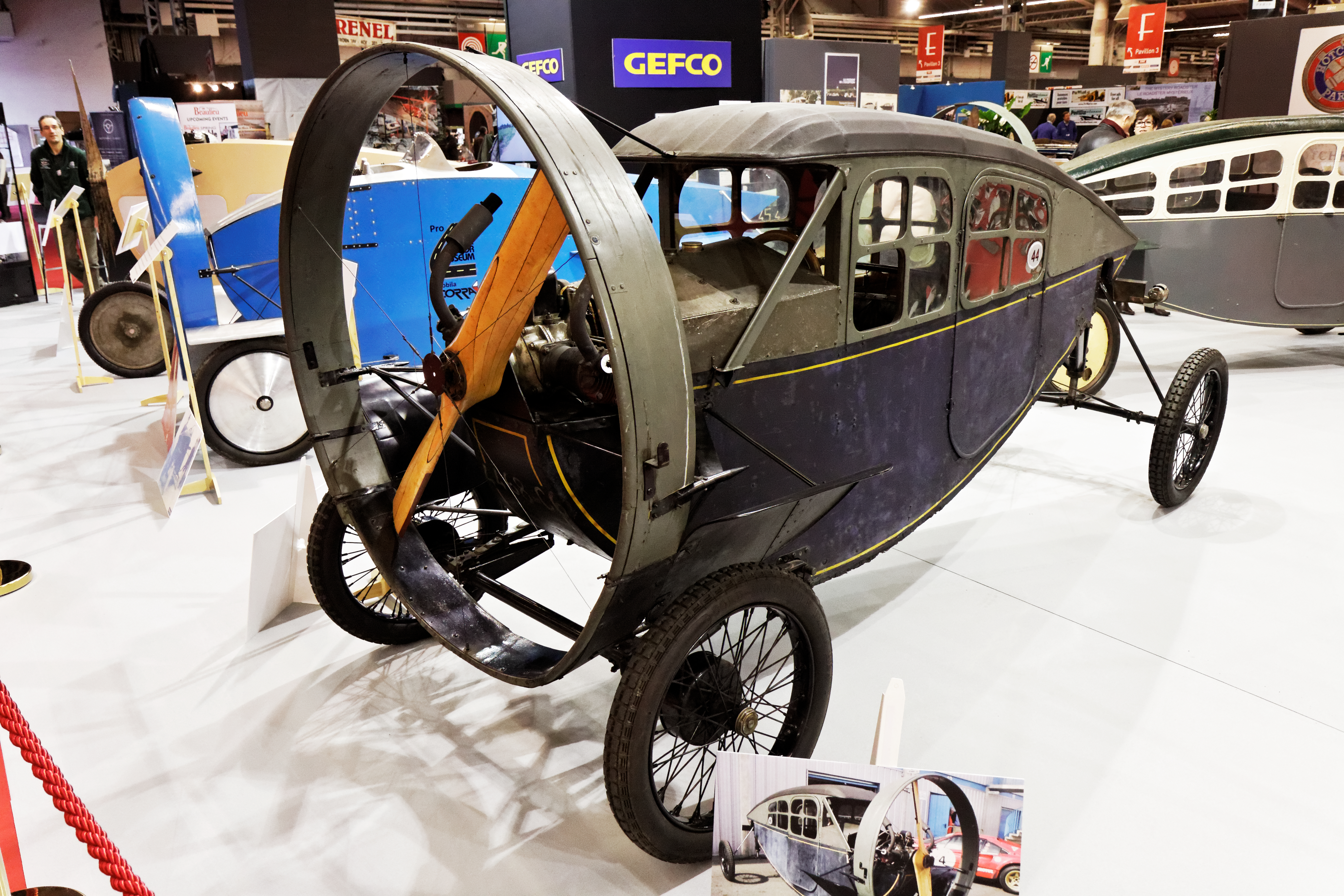 Une voiture à hélice Leyat conduite intérieure présentée lors du salon Retromobile 2013.